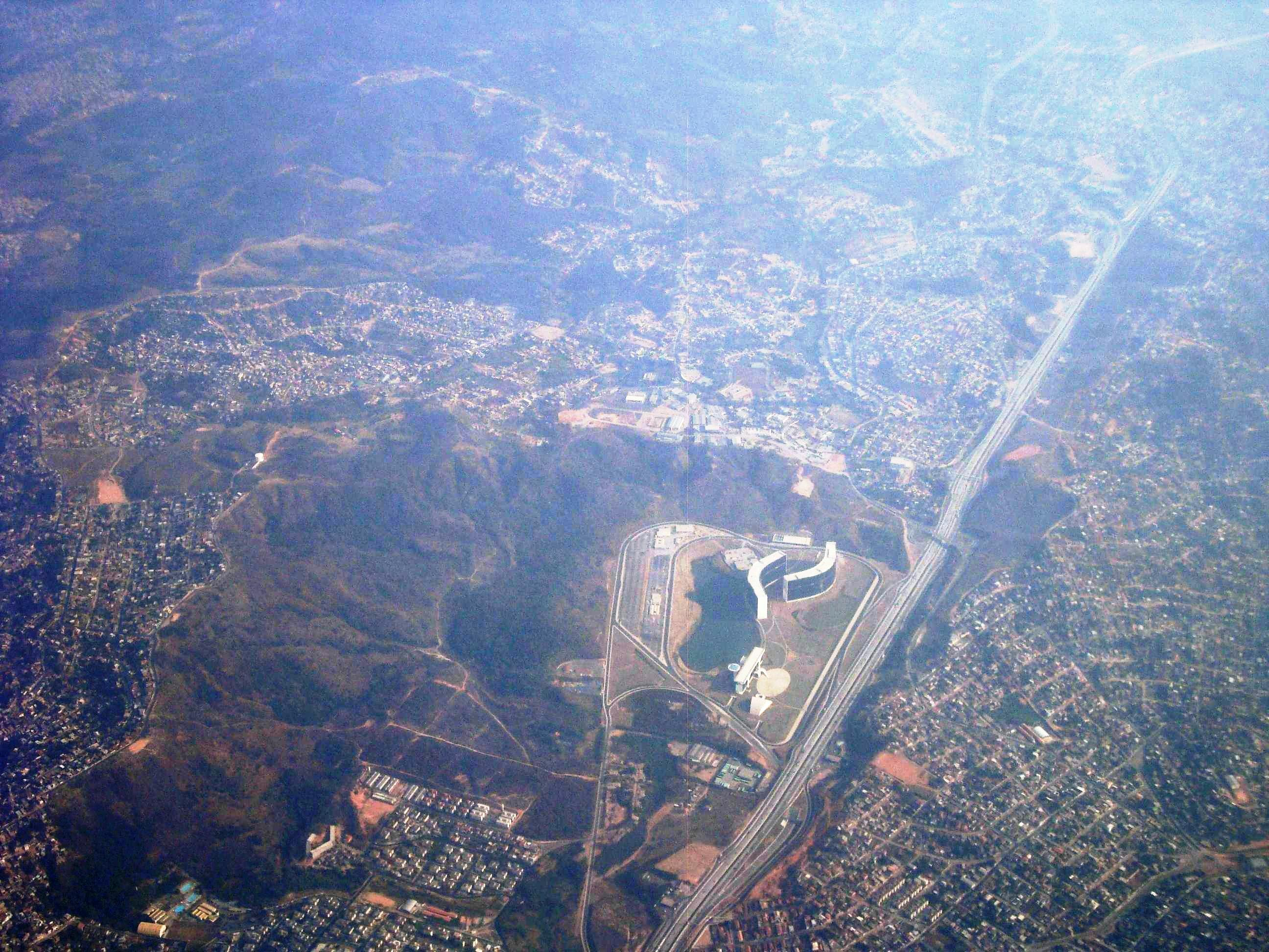 Cidade Administrativa de Minas Gerais